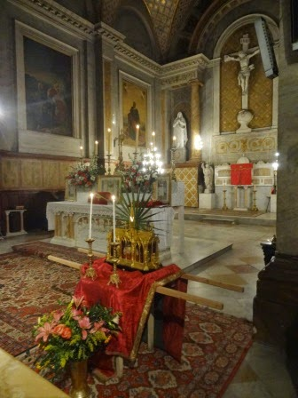 Reliques de Sainte Eulalie